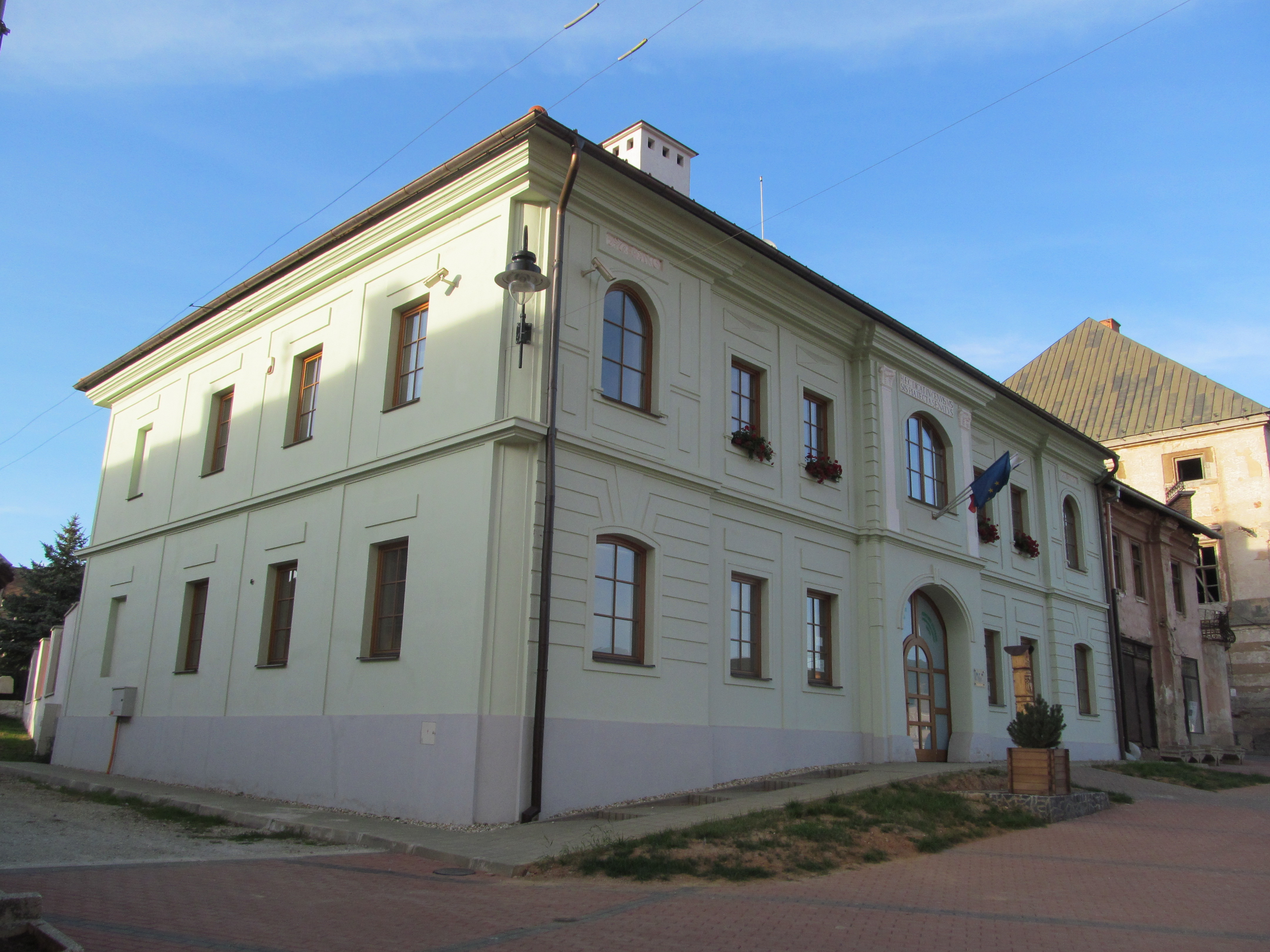 Dom meštiansky